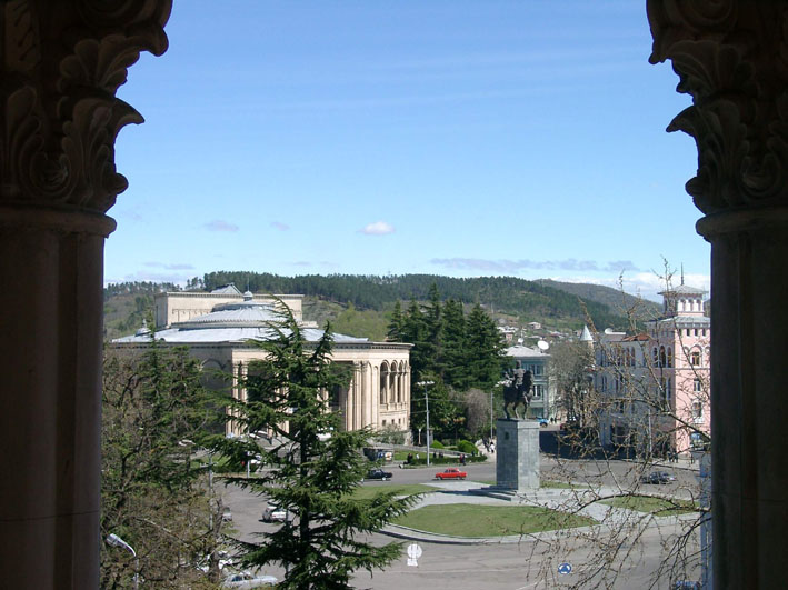 Kutaisi